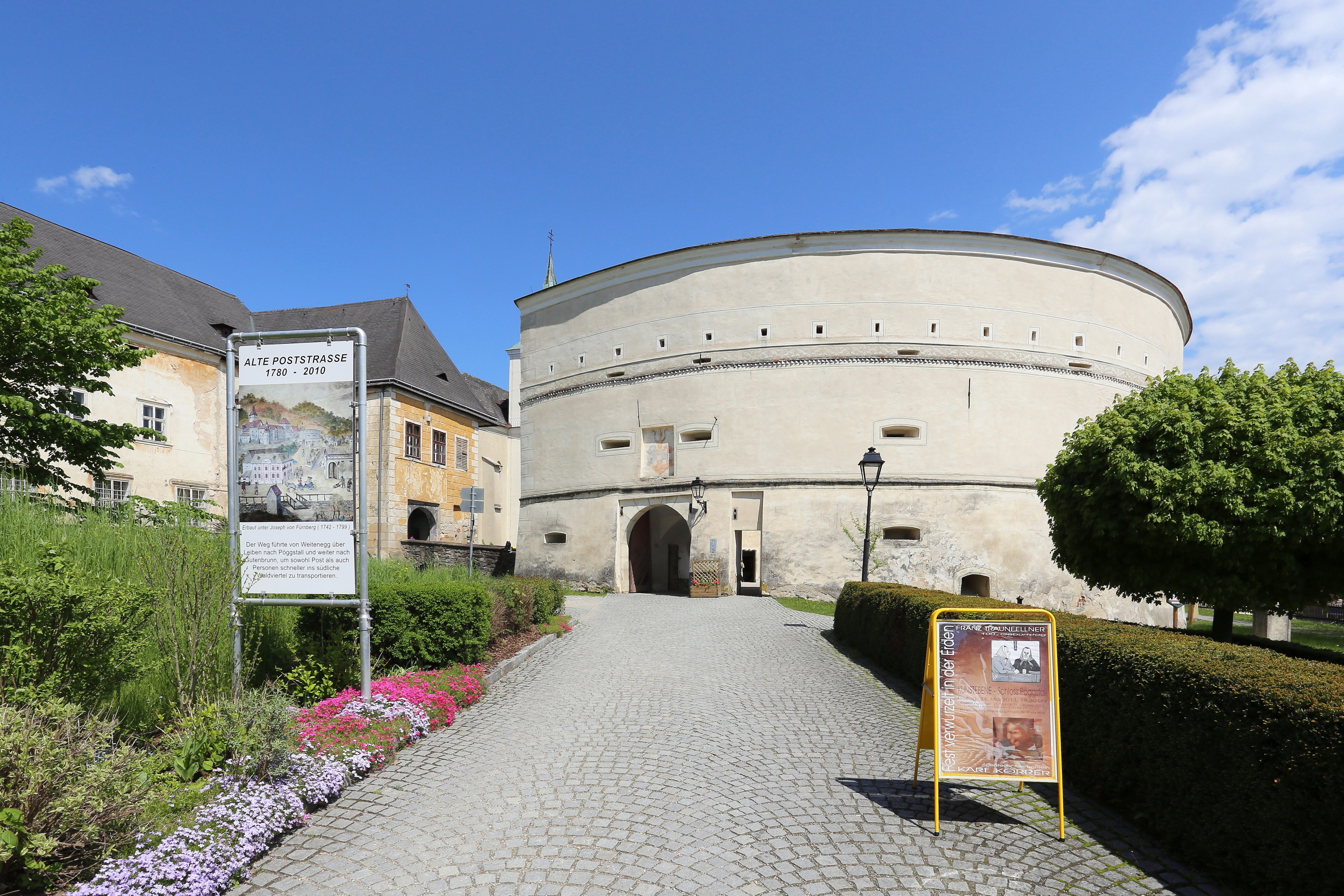 Kanonenrondell neben dem Schloss in der niederösterreichischen Marktgemeinde Pöggstall.